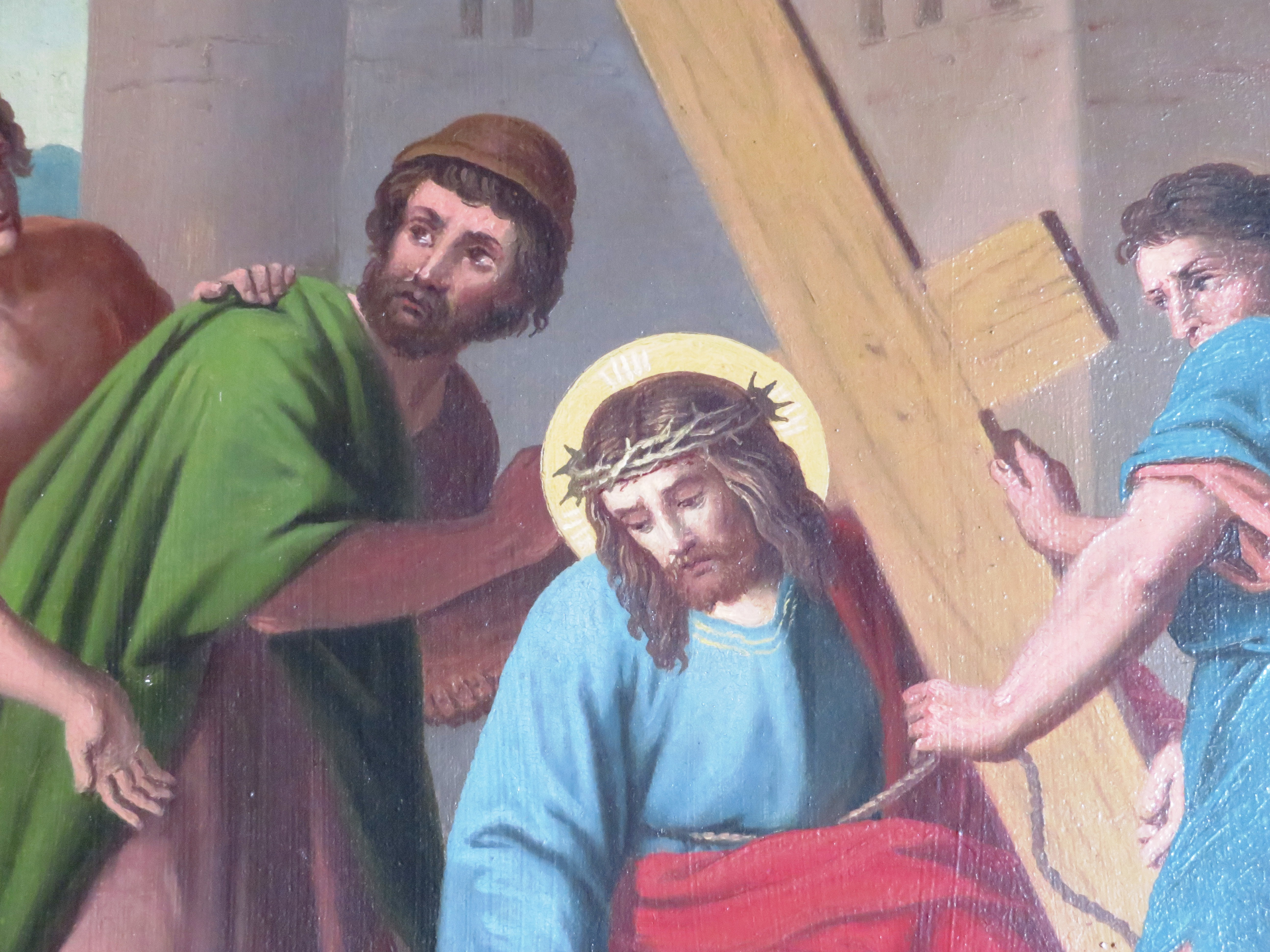 St. Peter und Paul (Hopfen)